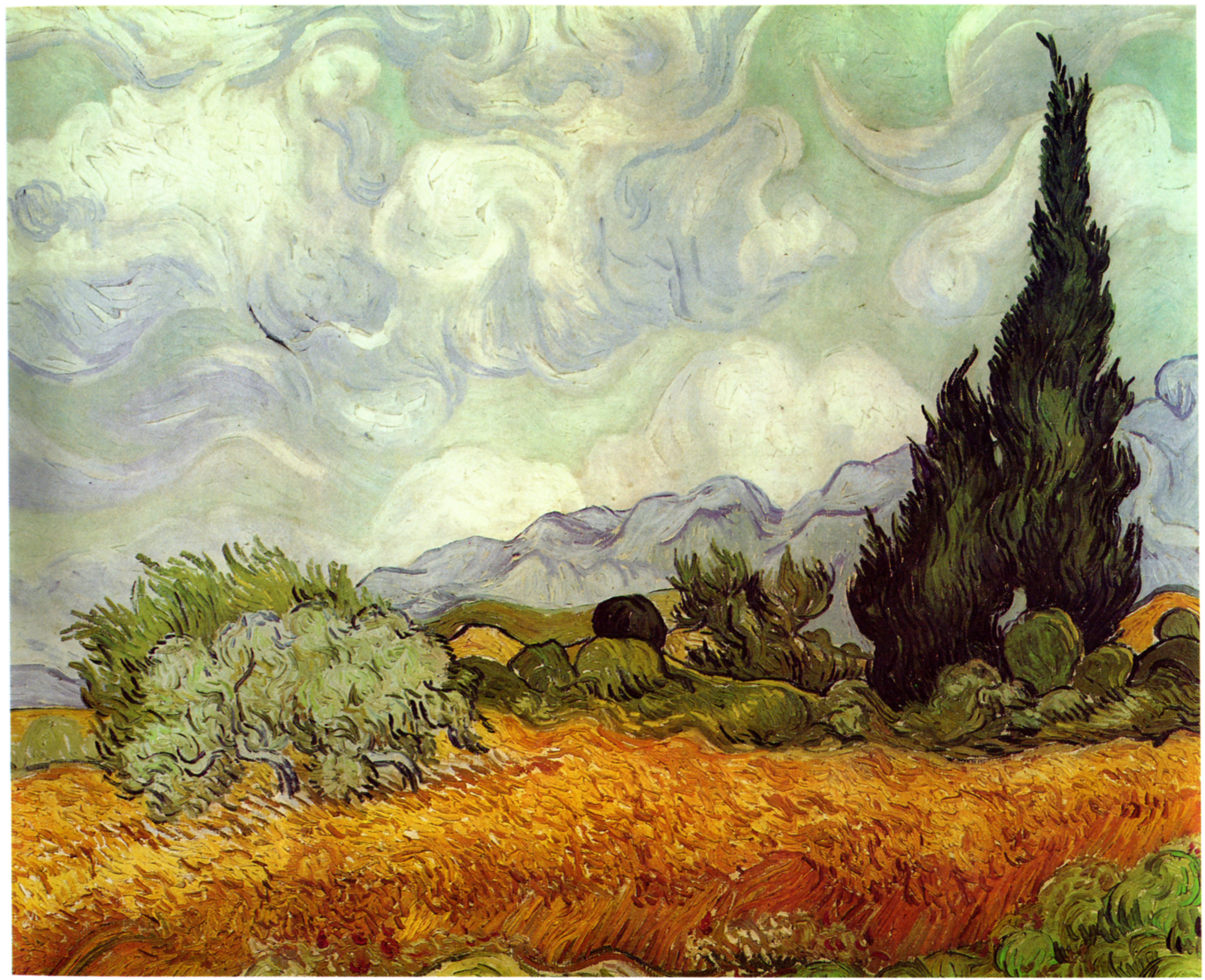 Vincent van Gogh: Kornfeld mit Zypressen. Oktober 1889, Öl auf Leinwand, 73 x 92 cm; London